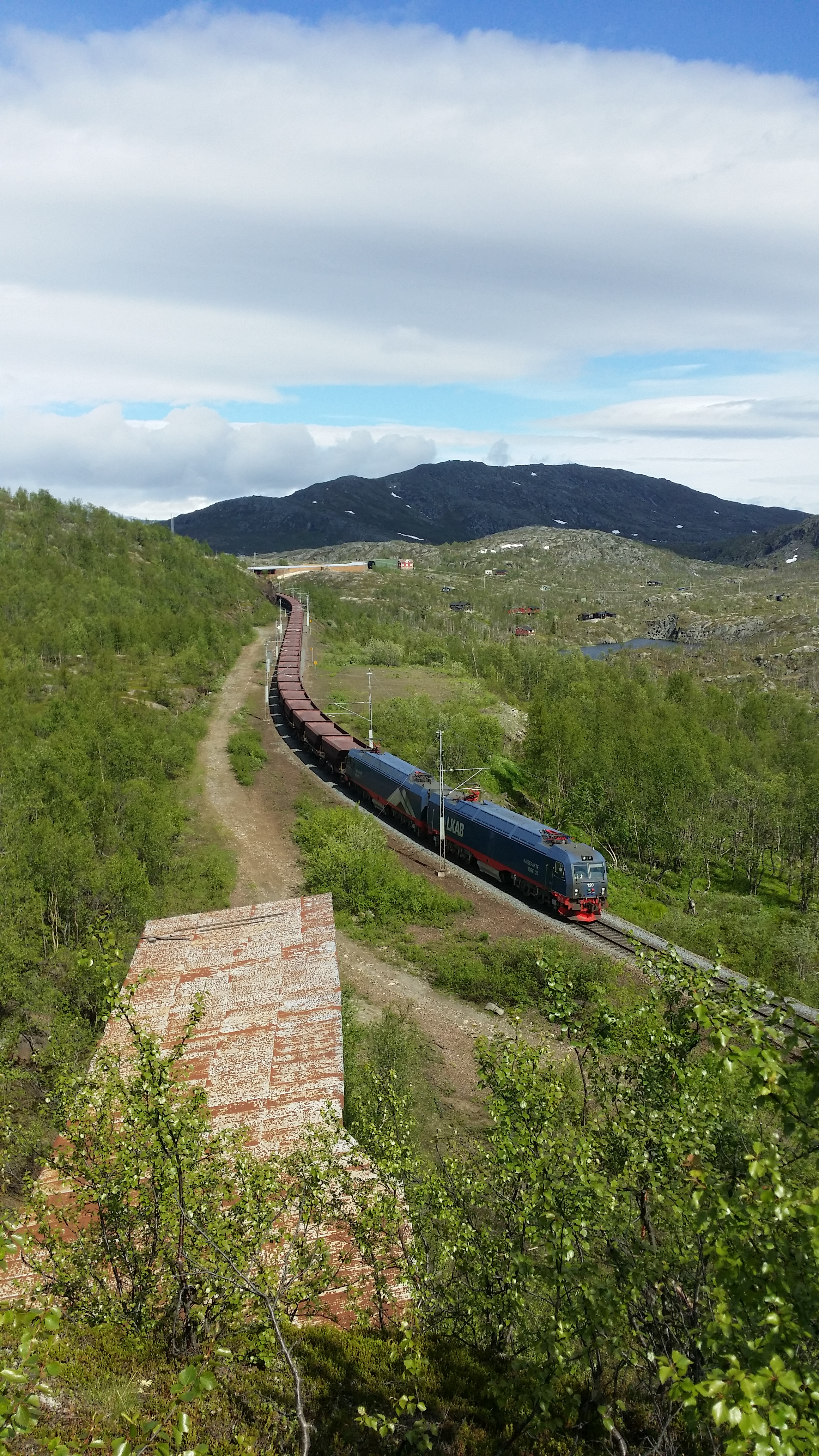 Tomta etter Gamle Bjørnfjell stasjon.